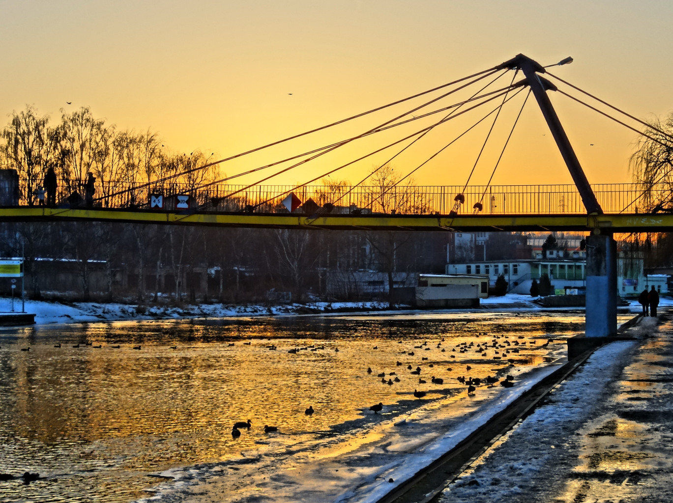 Kładka Esperanto nad Brdą w Bydgoszczy